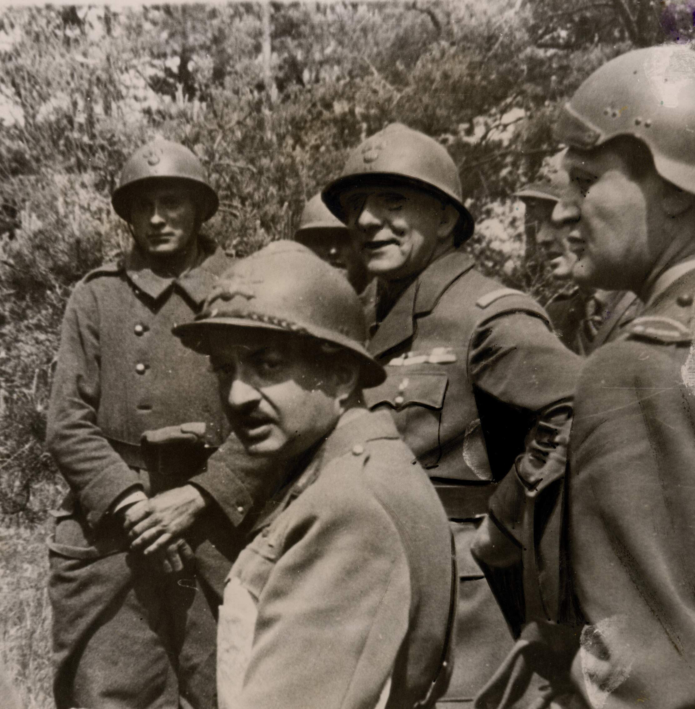 Jean de Lattre de Tassigny ; lors des combats de Rethel.